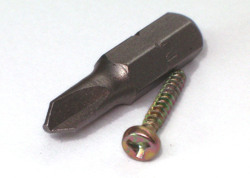 Końcówka wkrętaka i wkręt z łbem typu Tri-Wing